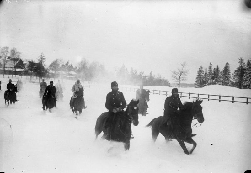 Schwedische Polizei bei einem Geländeritt im Schnee! Eine schwedische Polizei-Patrouille beim Uebungsritt durch die tief verschneite Winterlandschaft.